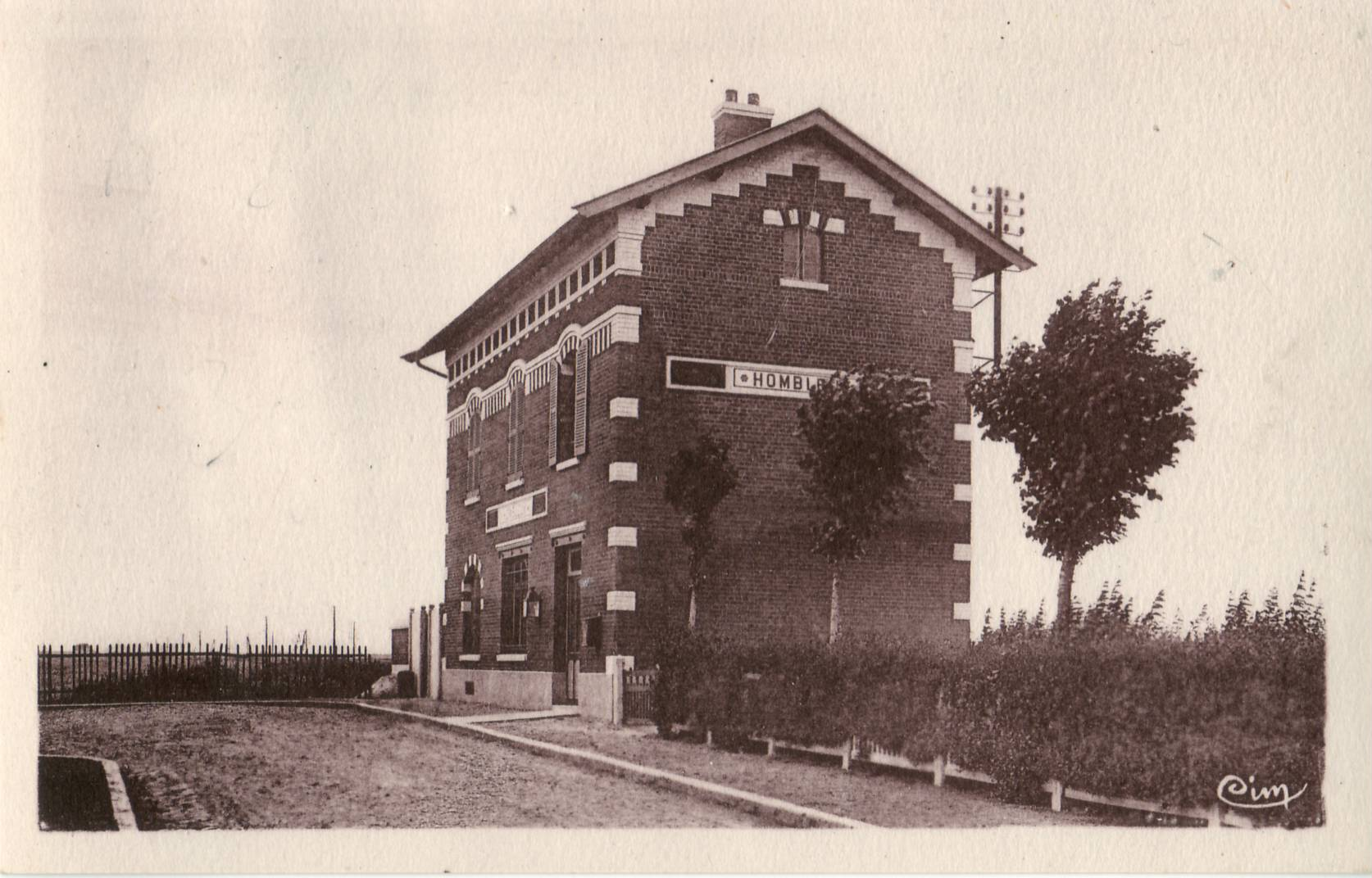 Carte postale semi-moderne éditée par CIM : HOMBLEUX - La Gare